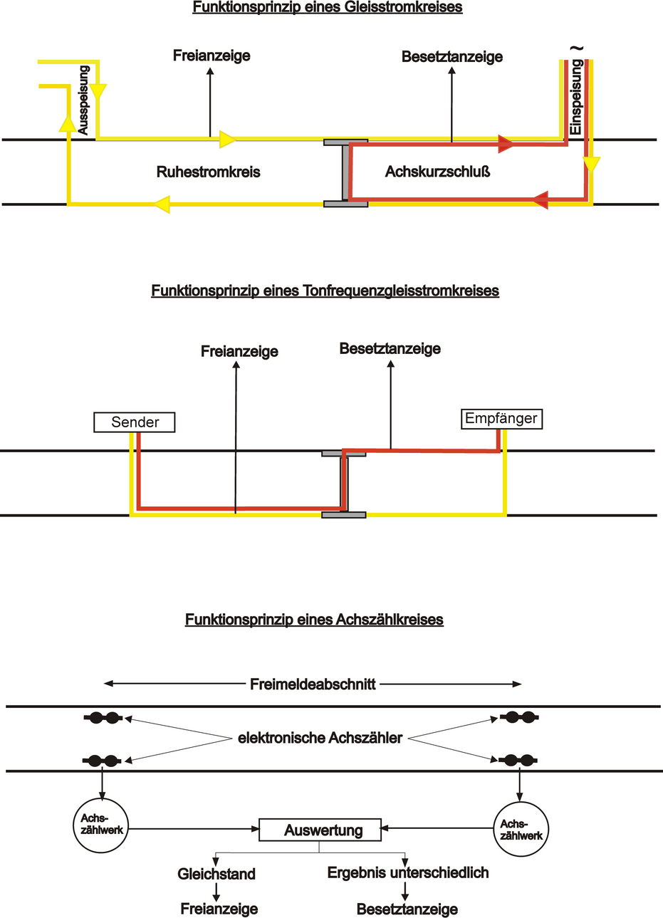 Schematische Darstellung einer Gleisfreimeldeanlage